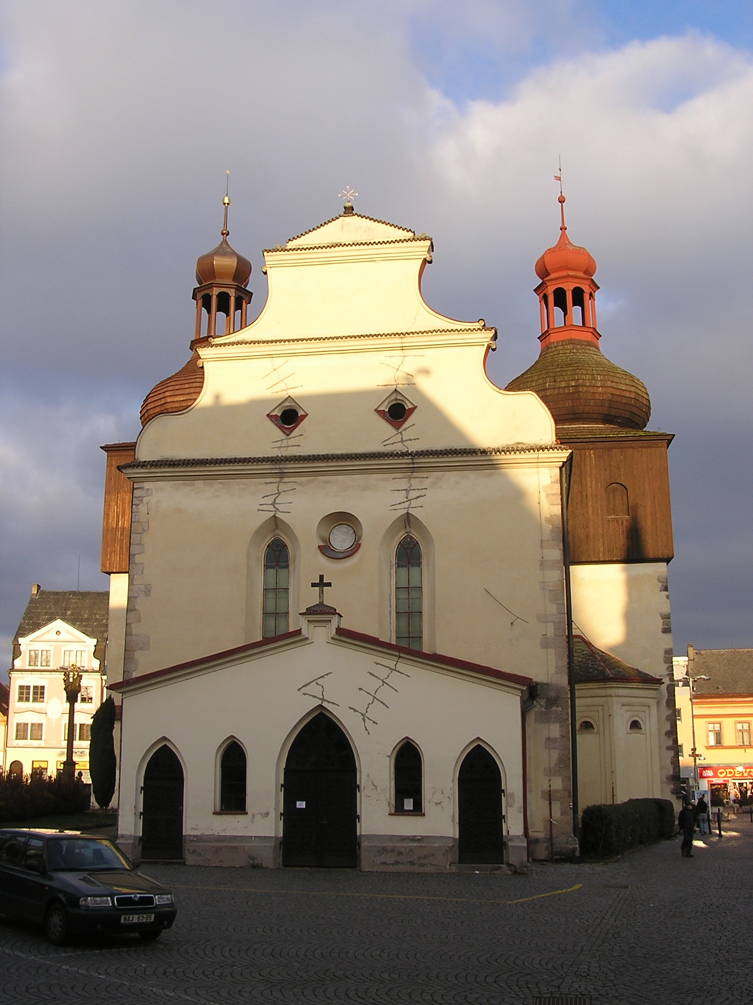 Kostel sv. Vavřince v Náchodě